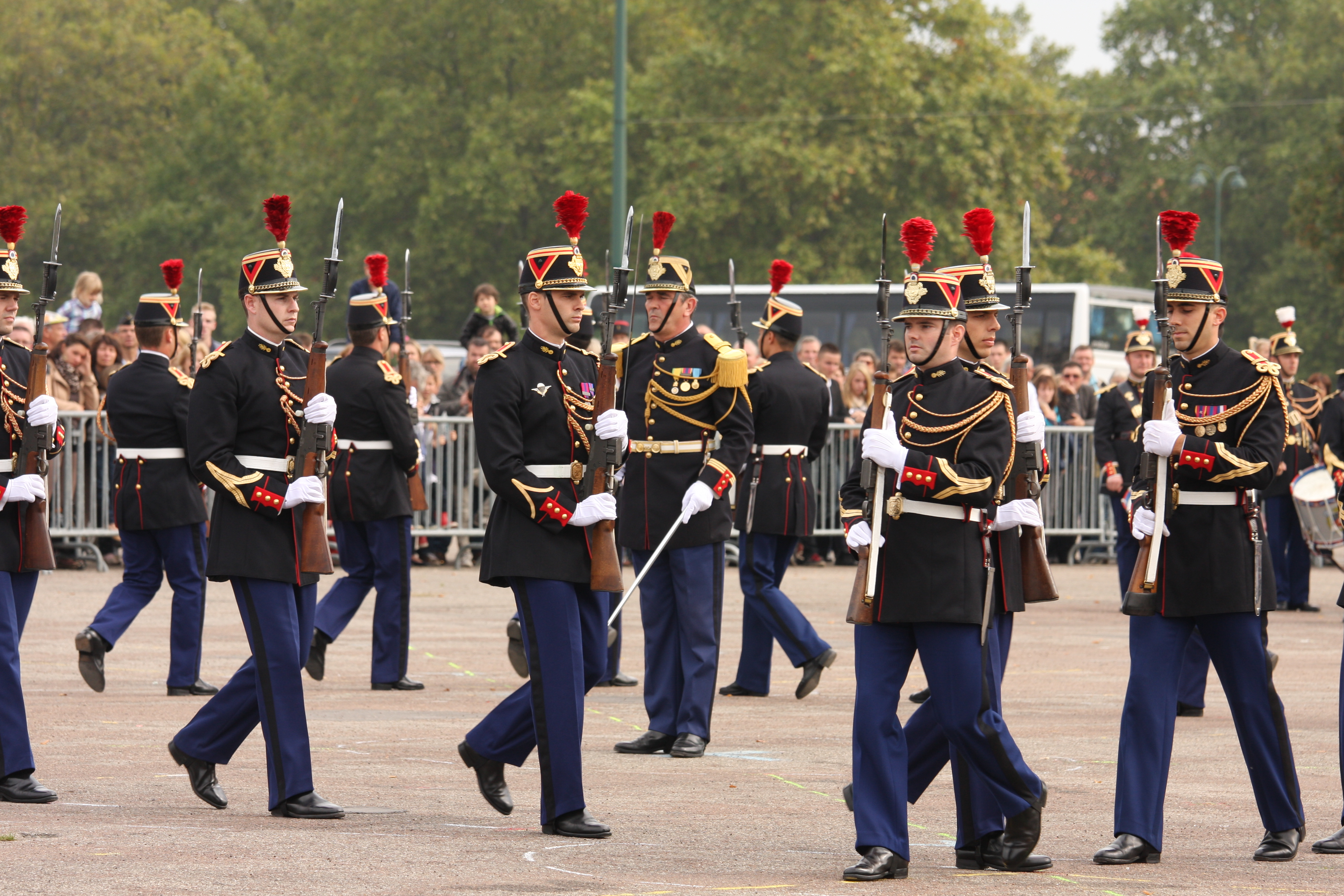 Quadrille des baïonnettes 2 - Quartier Carnot - Septembre 2013